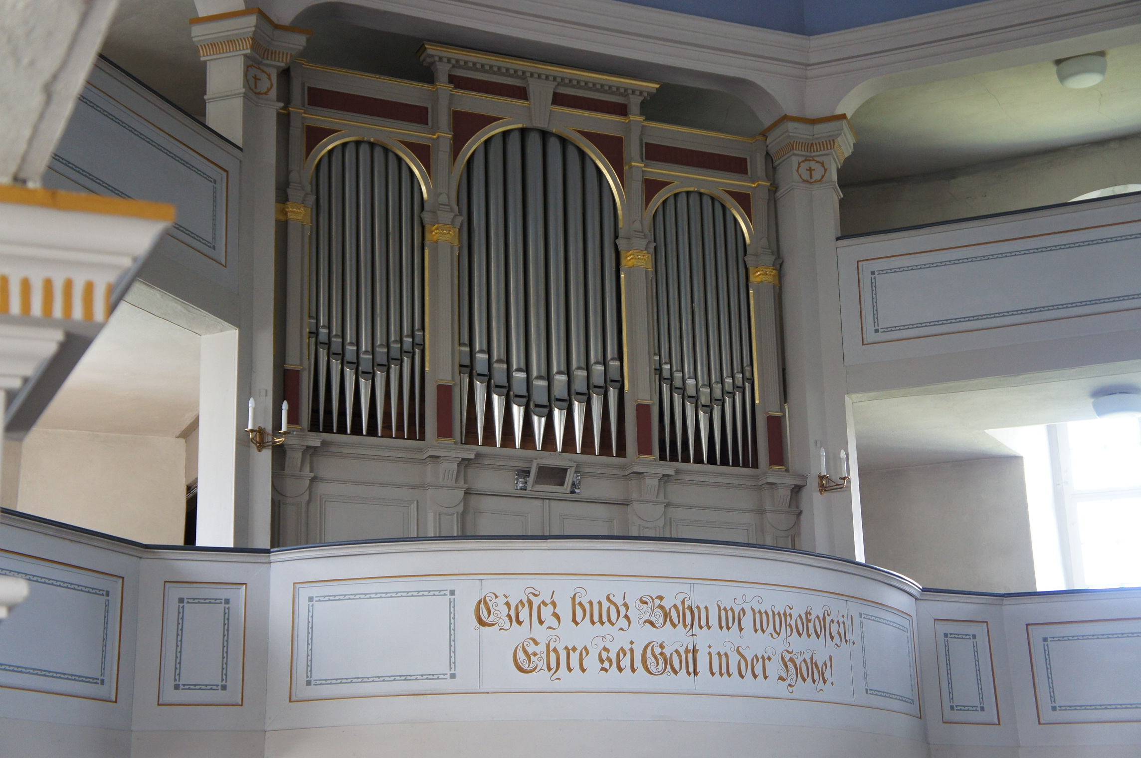 Evangelisch-Lutherische Kirche in Oßling. Erbaut von 1803-1805. Abriss der alten Kirche 1805 (1410 geweiht), aus den Steinen wurde der Turm der neuen Kirche gebaut. Die alten Glocken klangen zur Kirchweihe 1805 vom neuen Turm. Hier die Orgel aus dem Jahr 1885, gebaut von der Firma Orgelbau Eule in Bautzen, damaliger Preis 5000 Mark Hornjoserbsce: Pišćele a serbsko-němski napis we Wóslinčanskej ewangelskej cyrkwi.